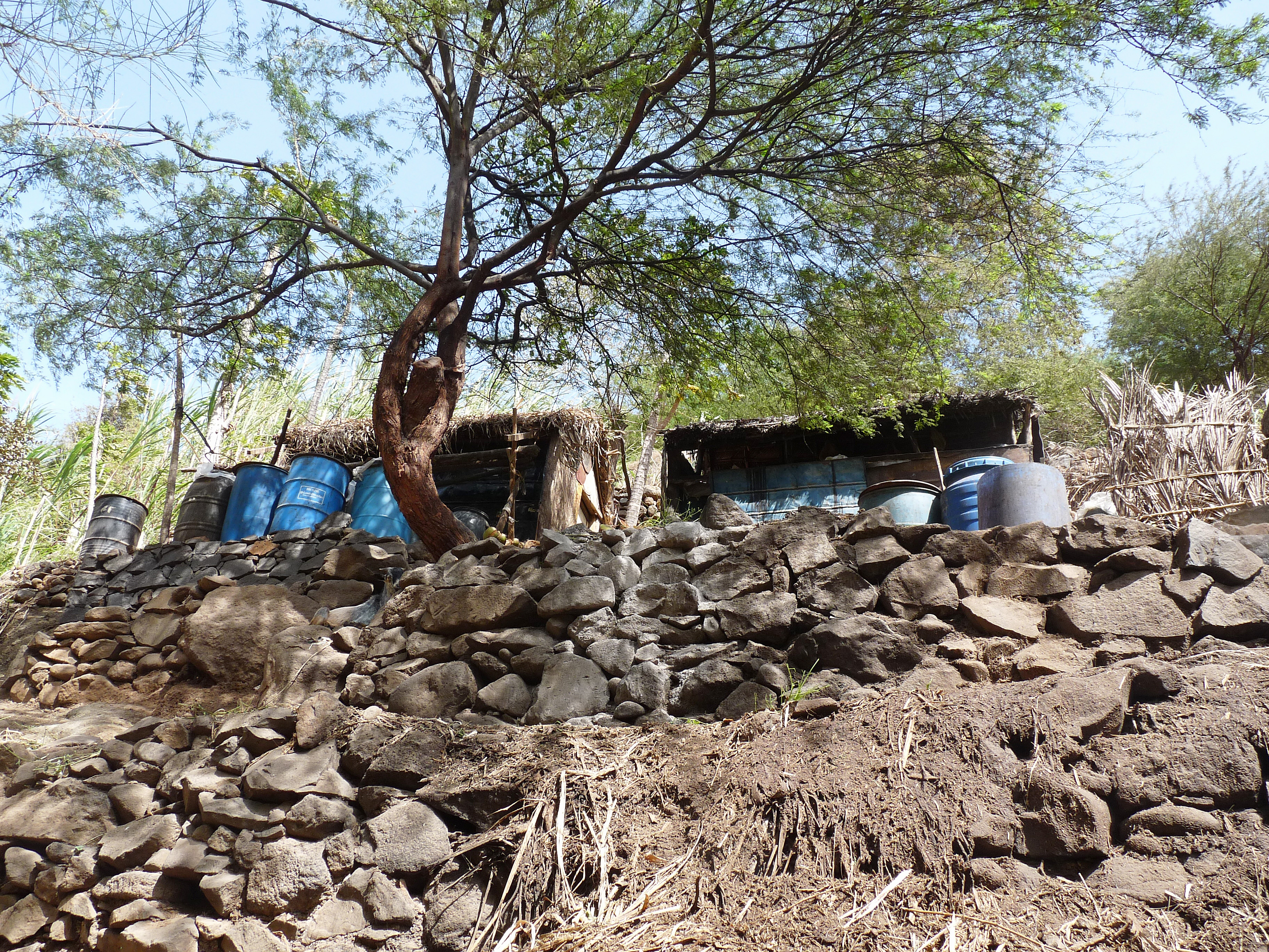 Ribeira Grande de Santiago (Cap-Vert) : distillerie artisanale (canne à sucre) pour la fabrication du grogue